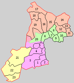 大分県速見郡の町村制時点の町村。